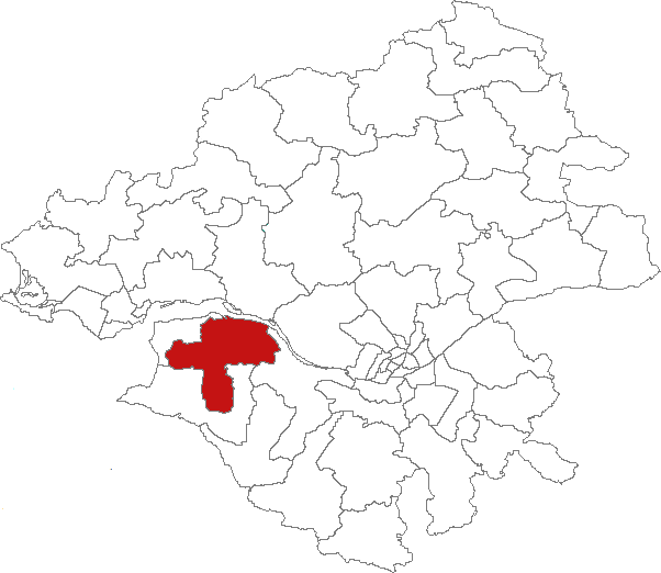 Carte de localisation du canton de Saint-Père-en-Retz (France, Loire-Atlantique)